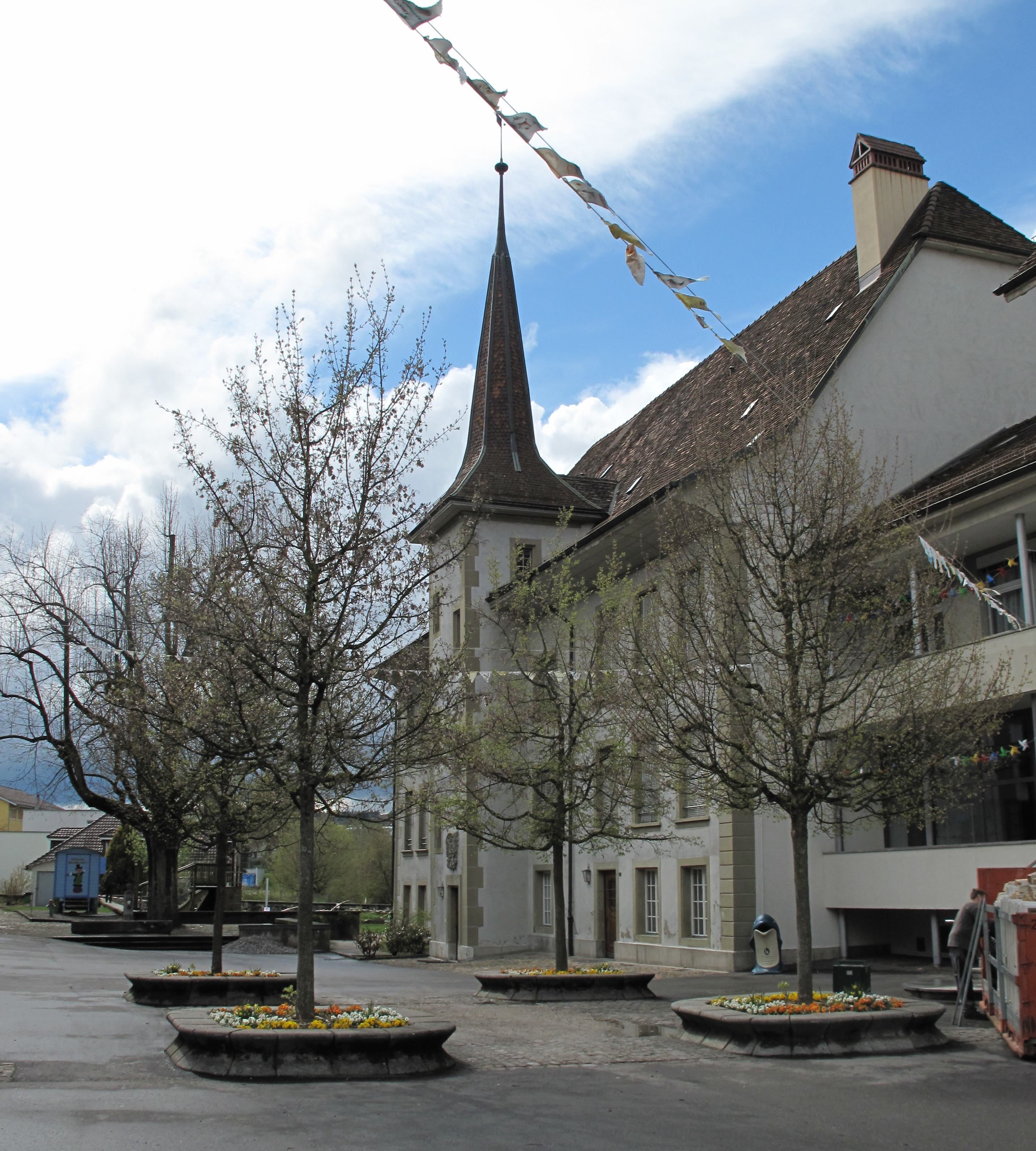 Münchenbuchsee, Schloss, erbaut 1600 bis 1603.